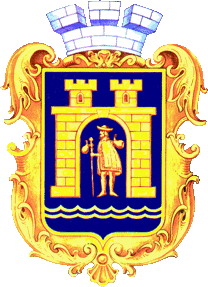 Сучасний герб м. Стрий Львівської області